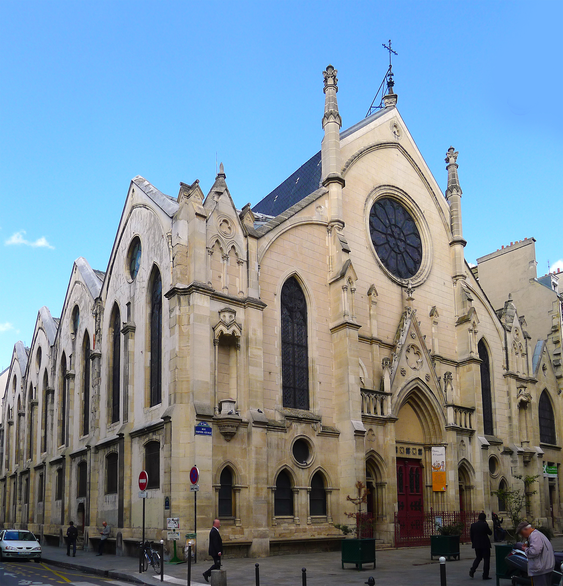 Église Saint-Eugène Sainte-Cécile (vue extérieure) - Paris IX